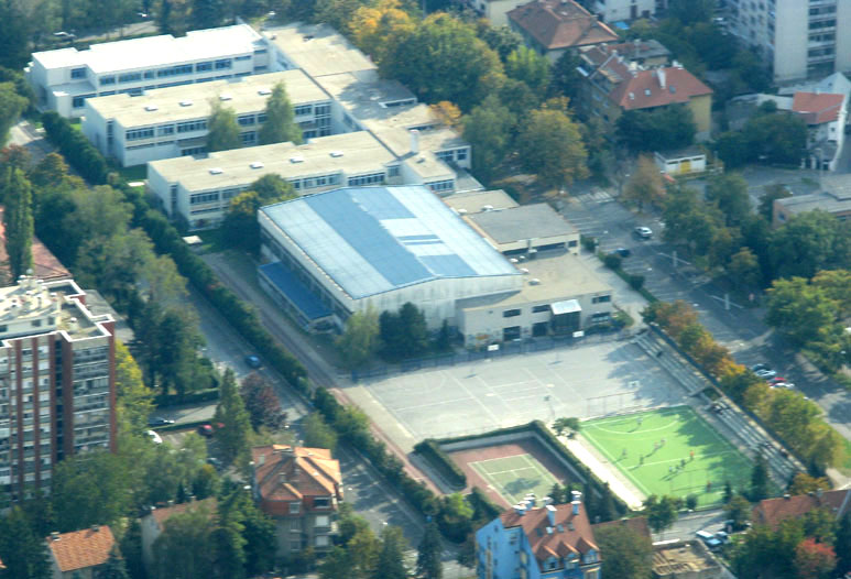 XV. gimnazija Zagreb (MIOC) iz zraka